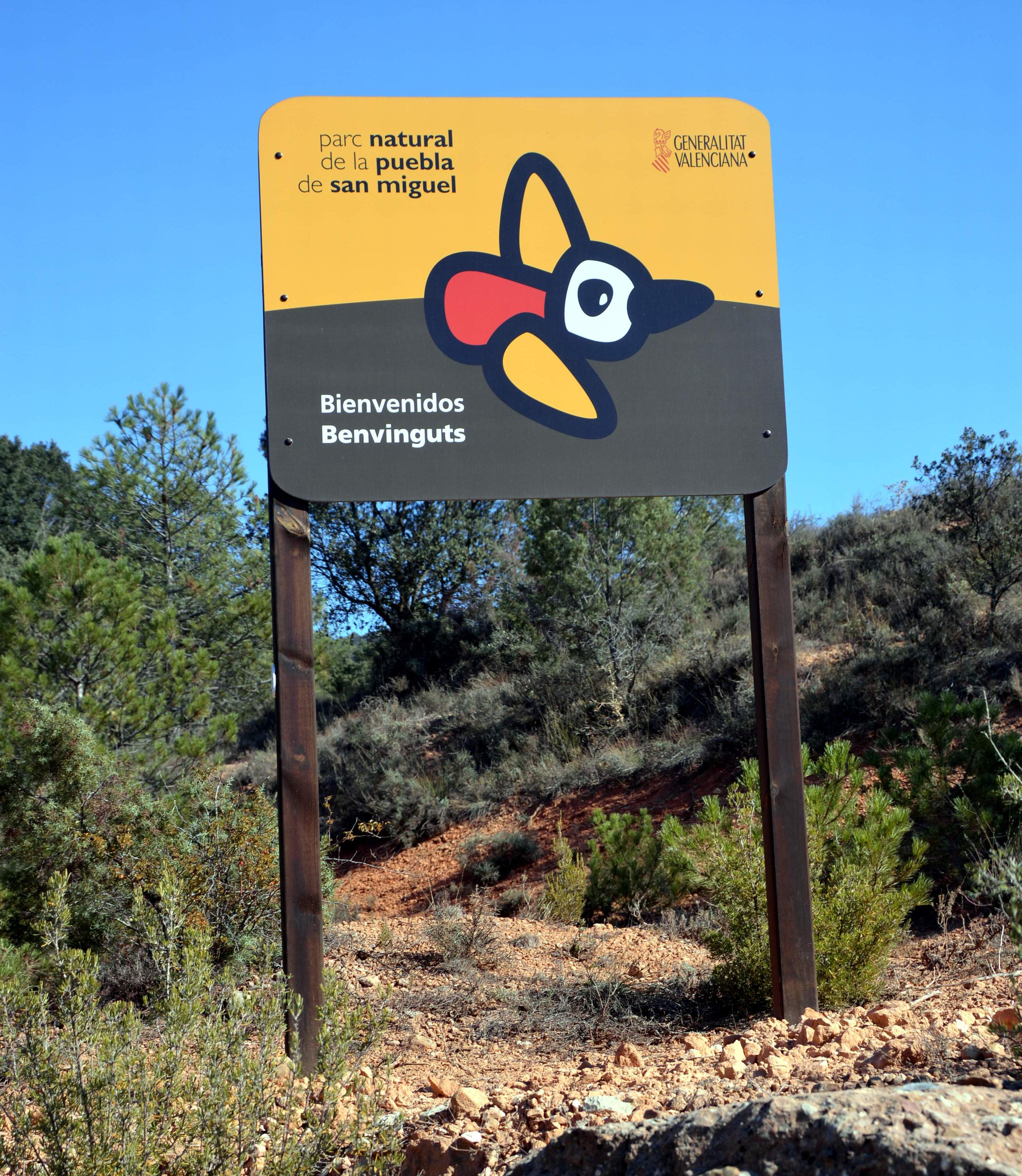 Detalle del cartel anunciador del Parque Natural de Puebla de San Miguel (Valencia), situado junto a la CV-363 (2017).